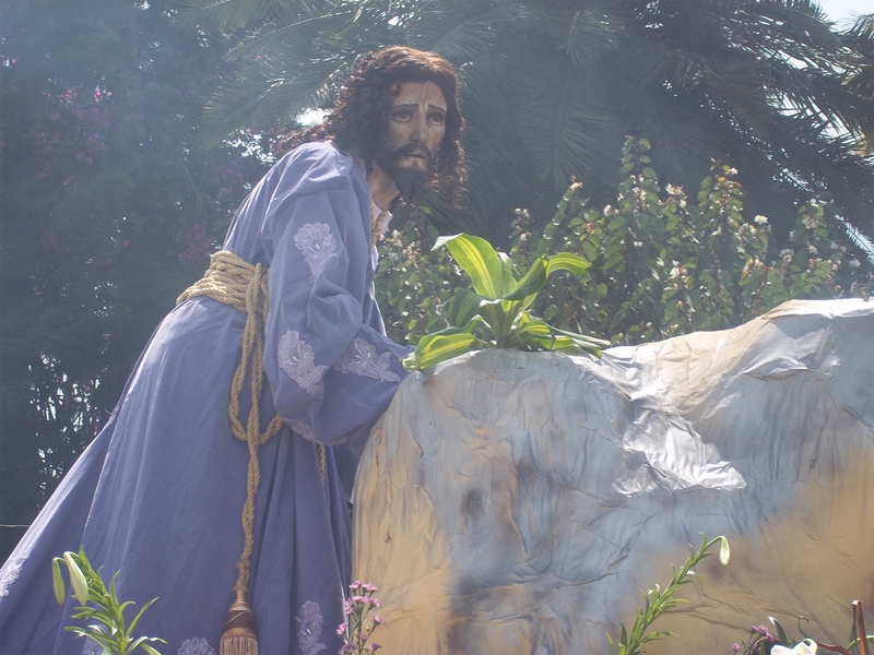 Como parte del Arte Sacro que data en San Cristóbal Verapaz se encuentra la Imagen más Venerada en la Parroquia Principal de la Villa, JESUS NAZARENO DE LA RESEÑA